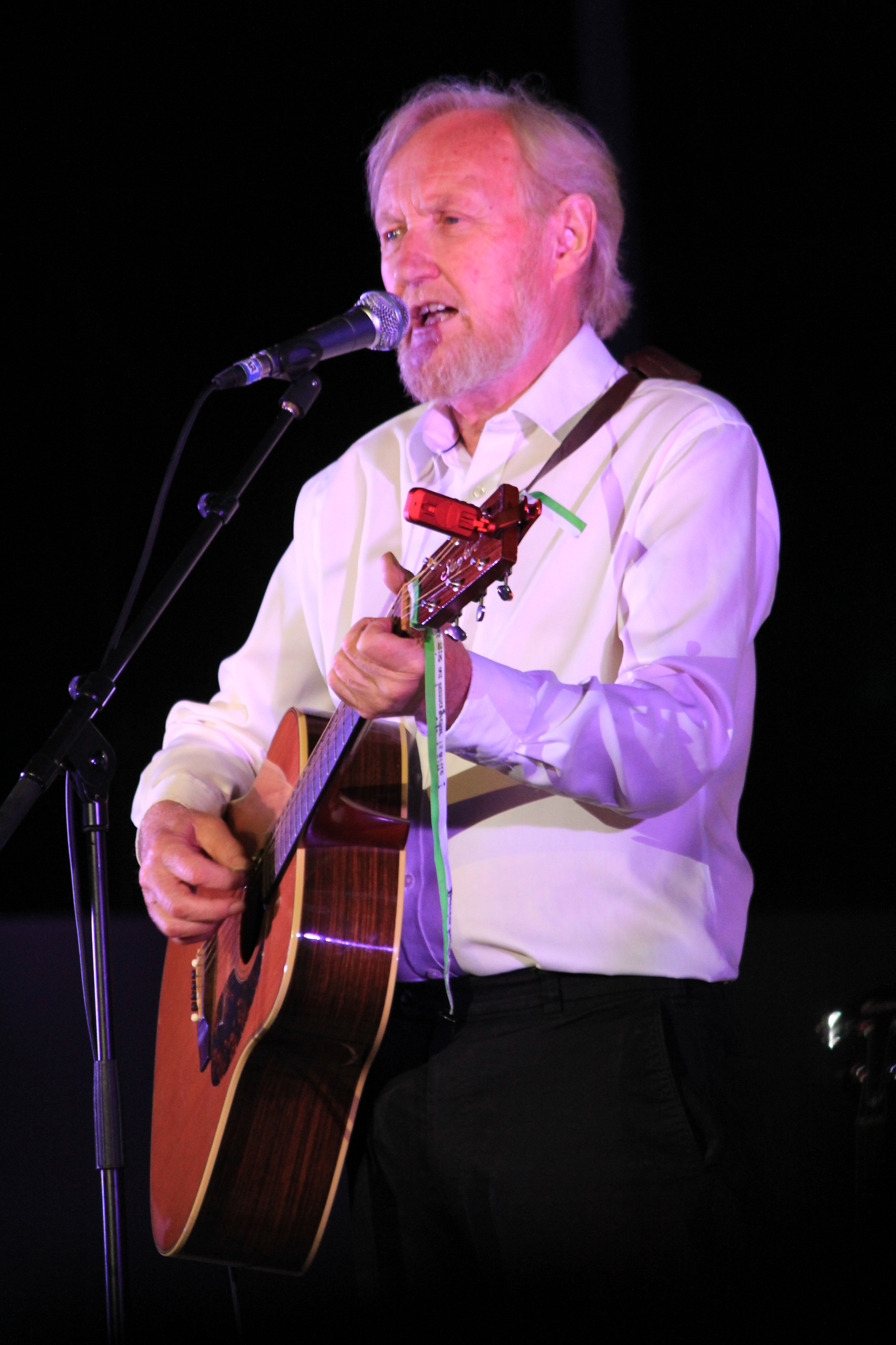 The Dublin Legends en concert au stade du moustoir lors du festival interceltique de Lorient 2014.